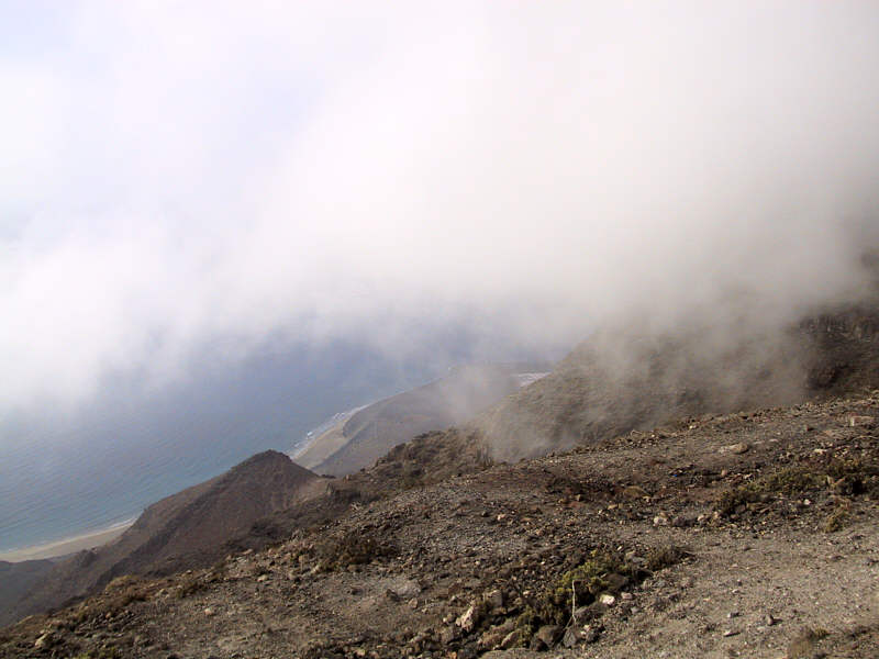 Wolkenkondensation an der Steilwand des Famara-Massivs